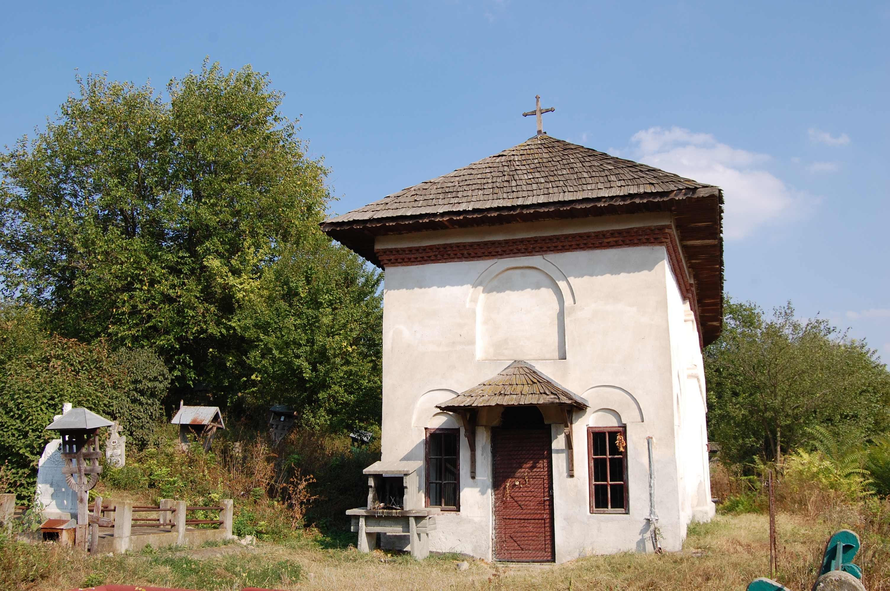 St. Gheorghe Church, Tarnava, Dolj